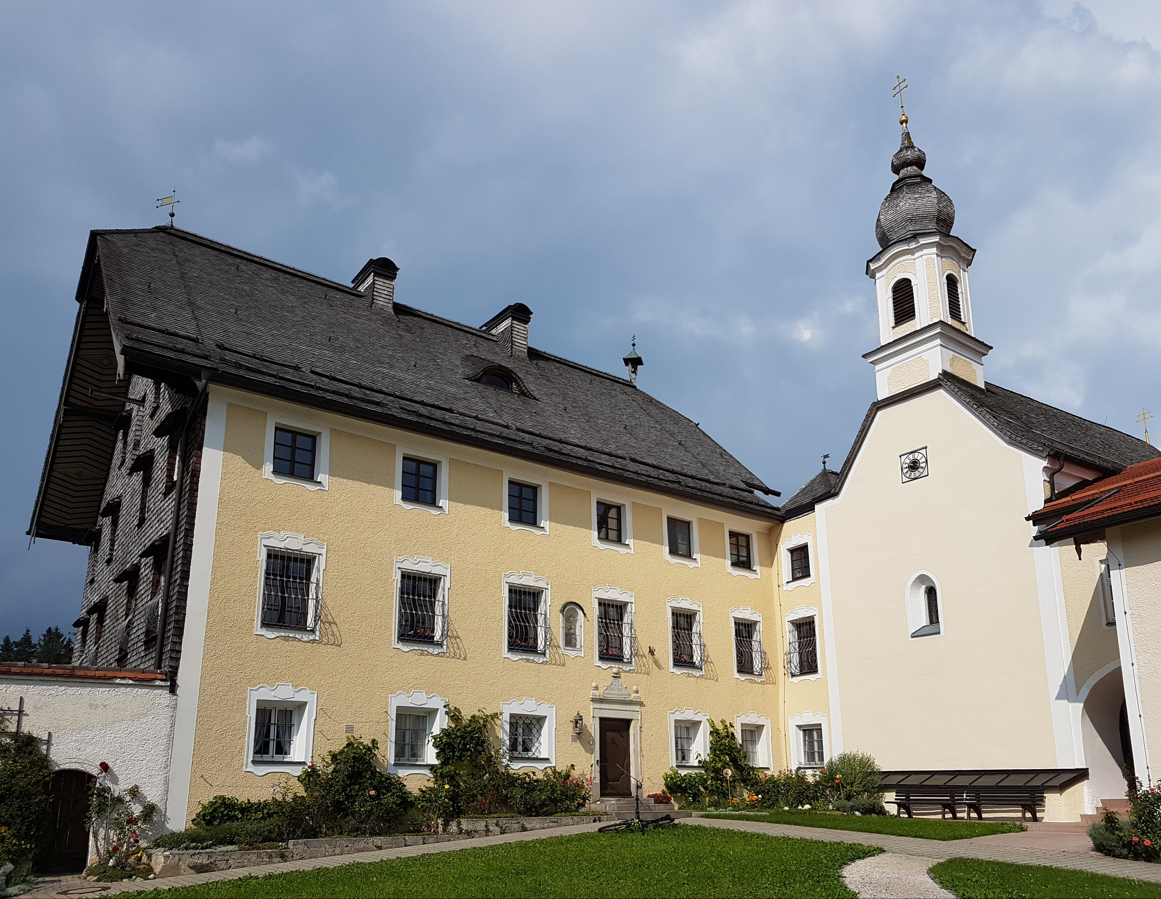 Ehem. Ökonomie-Pfarrhof Harpfetsham